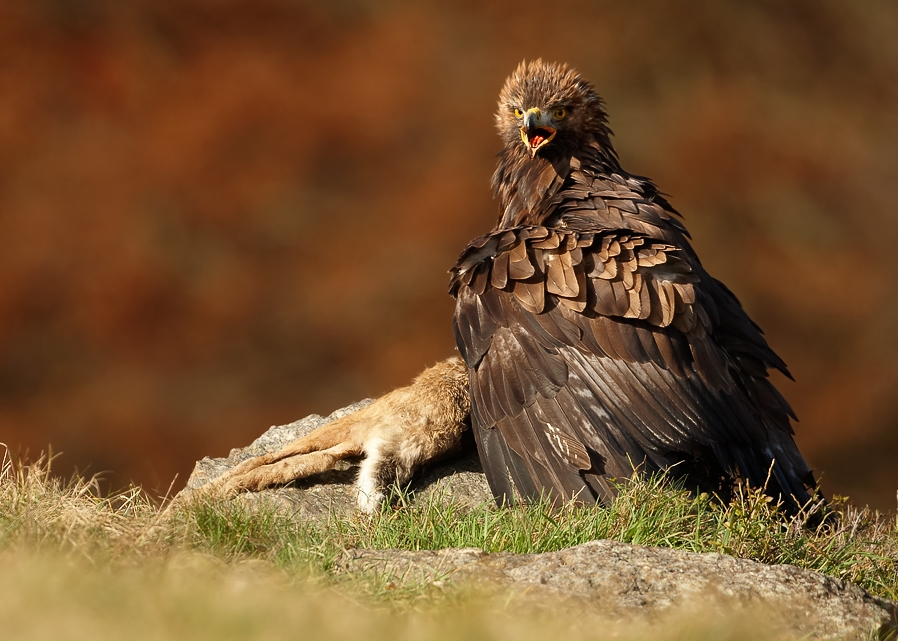 Golden eagle (Aquila chrysaetos) with European here (Lepus europaeus) prey, Žďárské vrchy, CZ